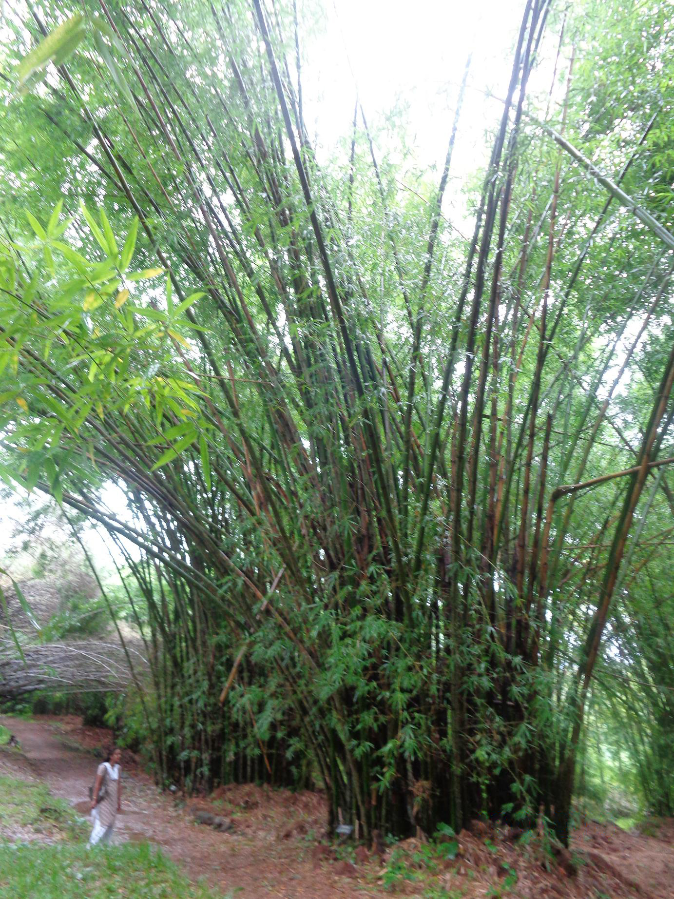 തൃശ്ശൂരിൽ പലപ്പിള്ളി വേലുപ്പാടത്തെ കേരള വനഗവേഷണകേന്ദ്രത്തിലെ തോട്ടത്തിൽ നിന്നും ഏടുത്തത്. താഴെ സ്ഥാപിച്ചിട്ടുള്ള ഫലകങ്ങളും കാണാം.